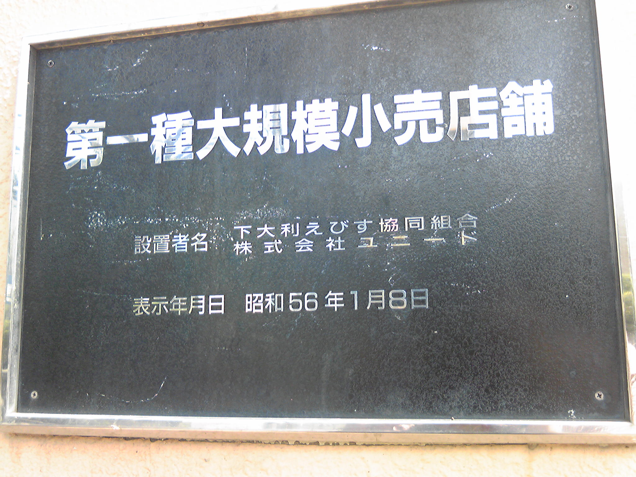 ダイエー下大利店の大規模小売店舗表示板